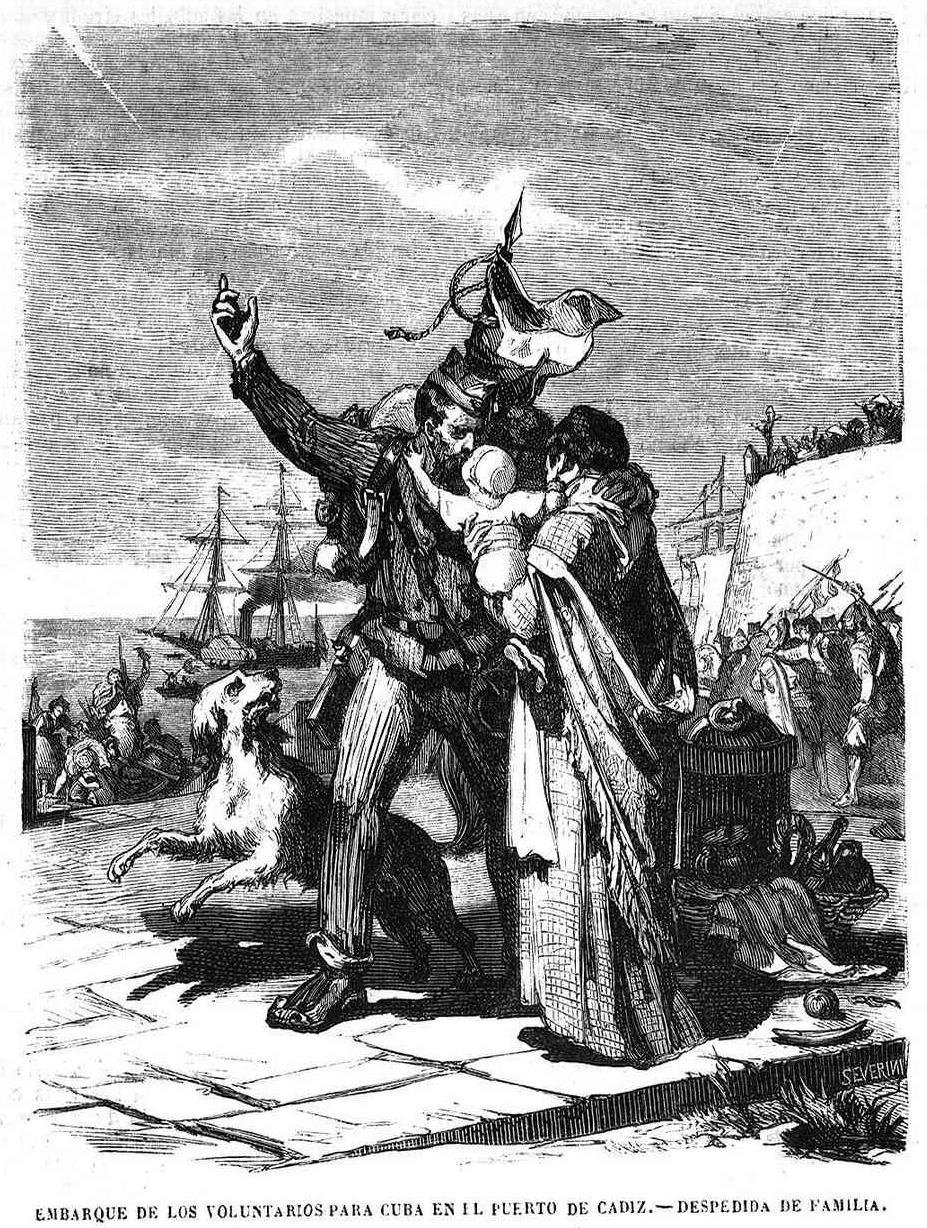 «Embarque de los voluntarios para Cuba en el puerto de Cádiz, despedida de familia», en la revista española El Museo Universal.